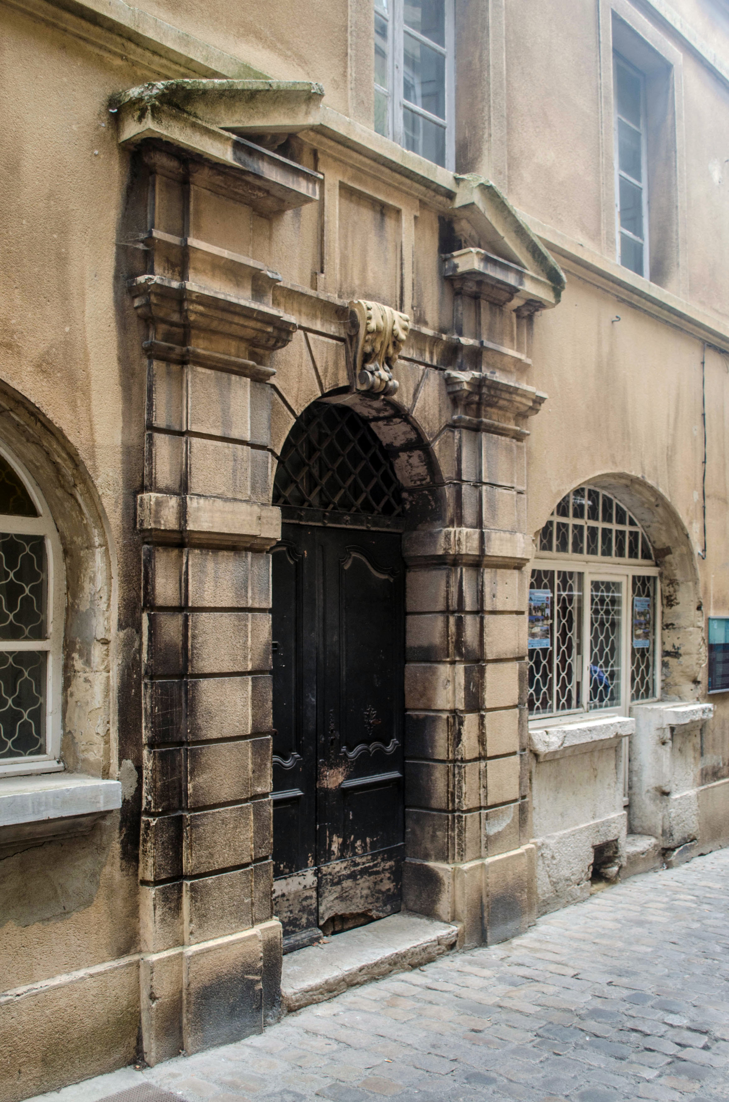 Valence, Drôme, France. Maison Dupré-Latour, portail d'entrée rue Pérollerie.